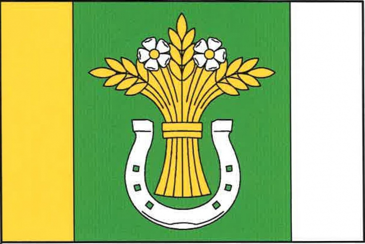 vlajka, Kvítkovice, okres České Budějovice